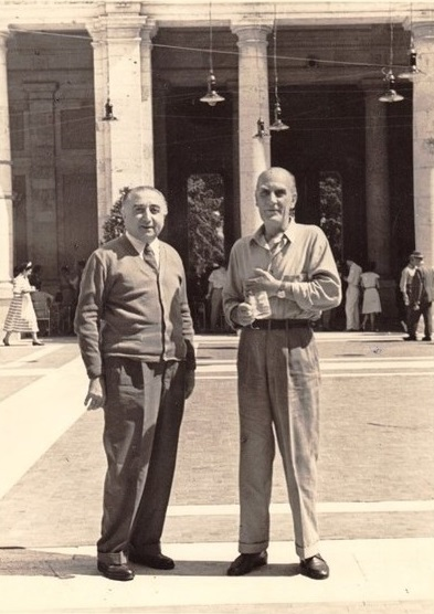 Da sinistra, il libraio Cesarino Branduani con l'attore Luigi Cimara